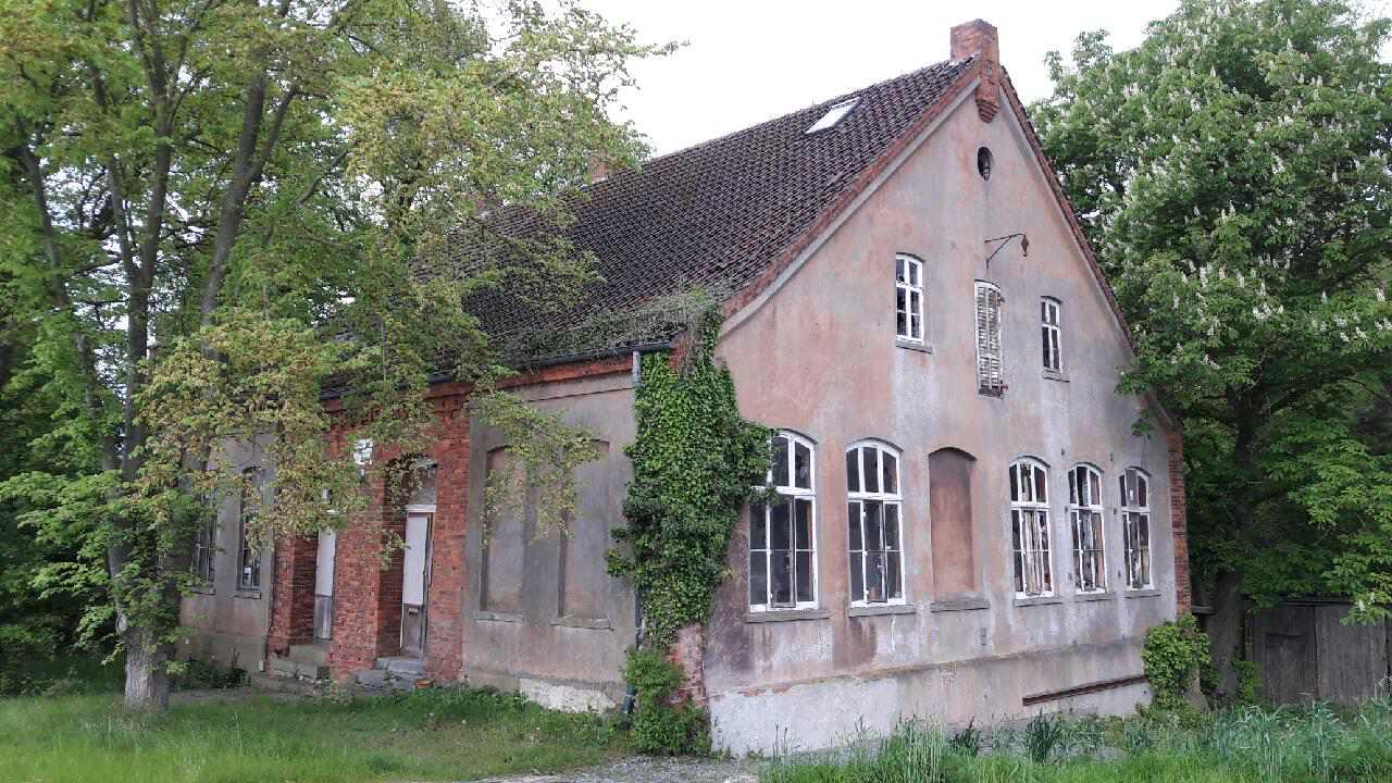 Schulgebäude in Mittelsbüren, errichtet 1880/1881